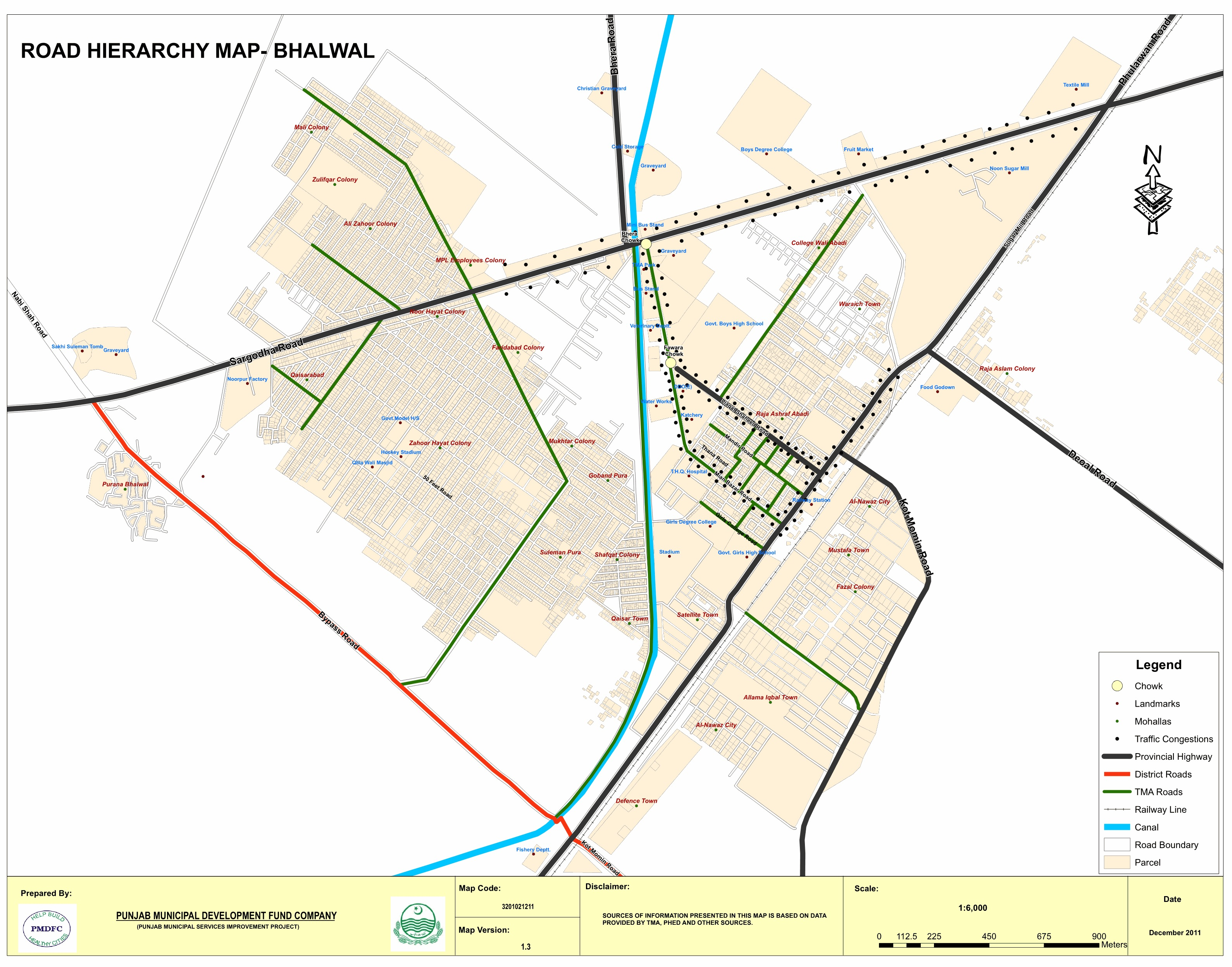 بھلوال